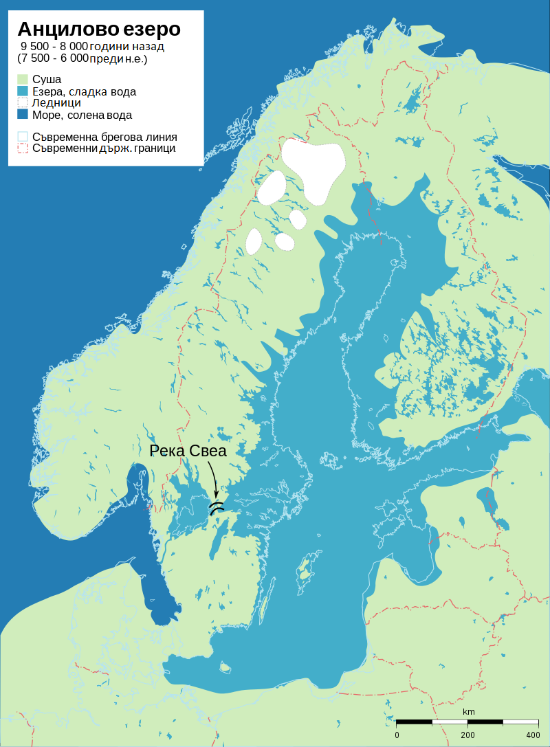 Анциловото езеро е име, дадено от геолозите на ледниковото езеро от сладка вода, което заменя Йодиево море, след като бива откъснато от приема на сол през централна Швеция (от източния край на канала, в близост до съвременния град Стокхолм), поради вдигане на Южните скандинавска форми на релефа ,които го изолират. Датира от преди около 9500-8000 година преди новата ера и калибрира в рамките само на Бореалния период.Езерото се превръща в "Литторино море", когато издигащите се океански нива преминaват през Великия пояс.